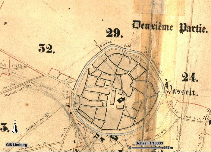 Atlas_buurtwegen,_Hasselt